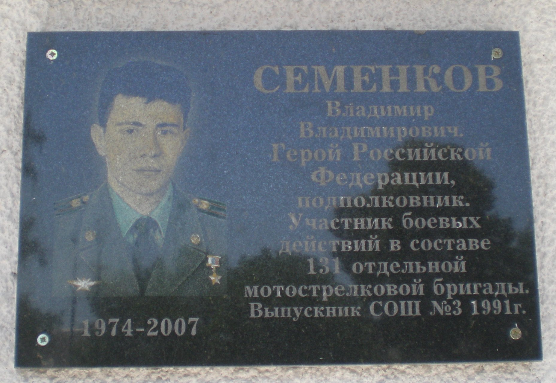 Мемориальная доска. Герой России Семенков Владимир Владимирович (1974-2007)